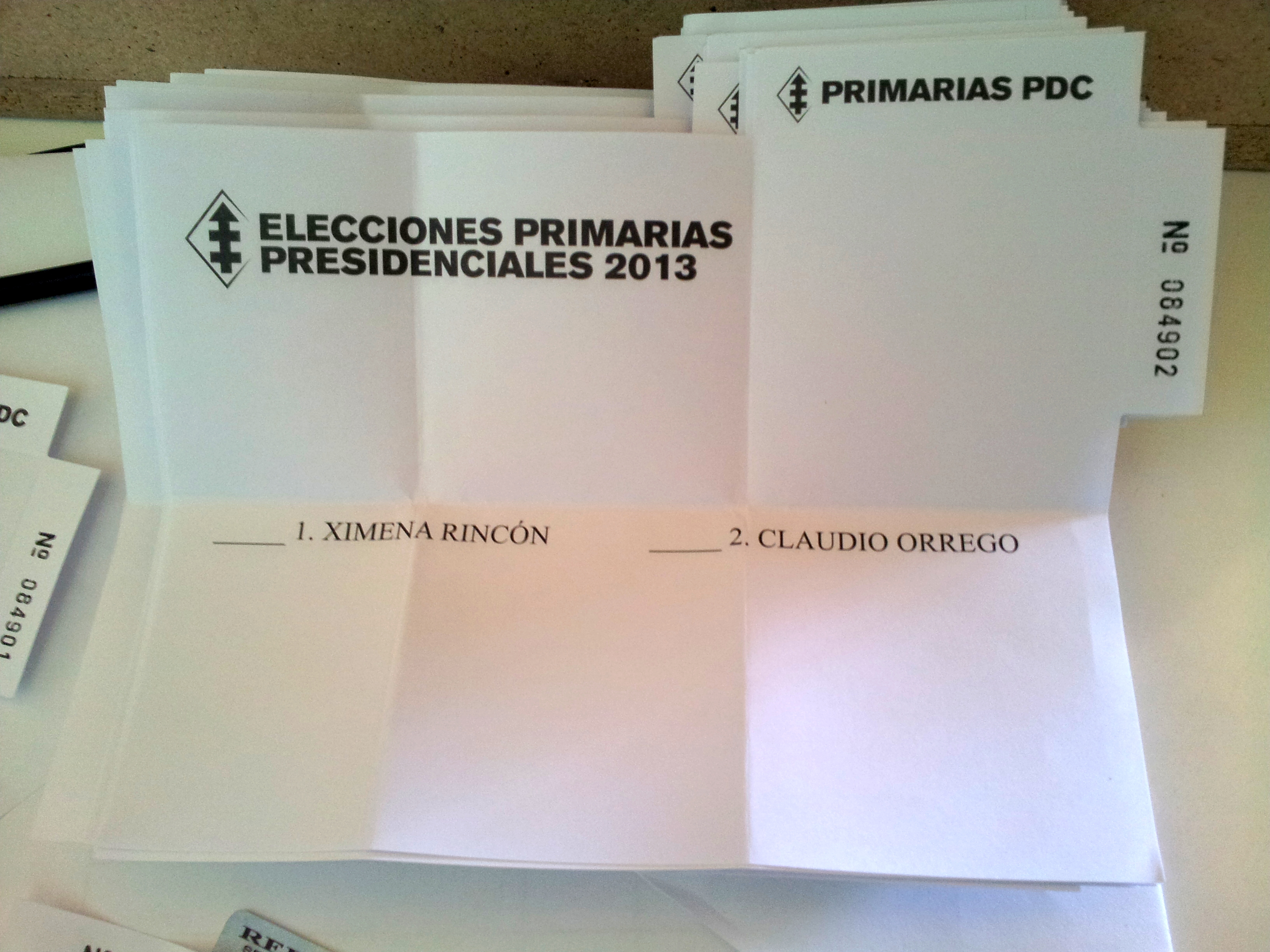 Voto de elecciones primarias del Partido Demócrata Cristiano (Chile) para las elecciones presidenciales de Chile en 2012